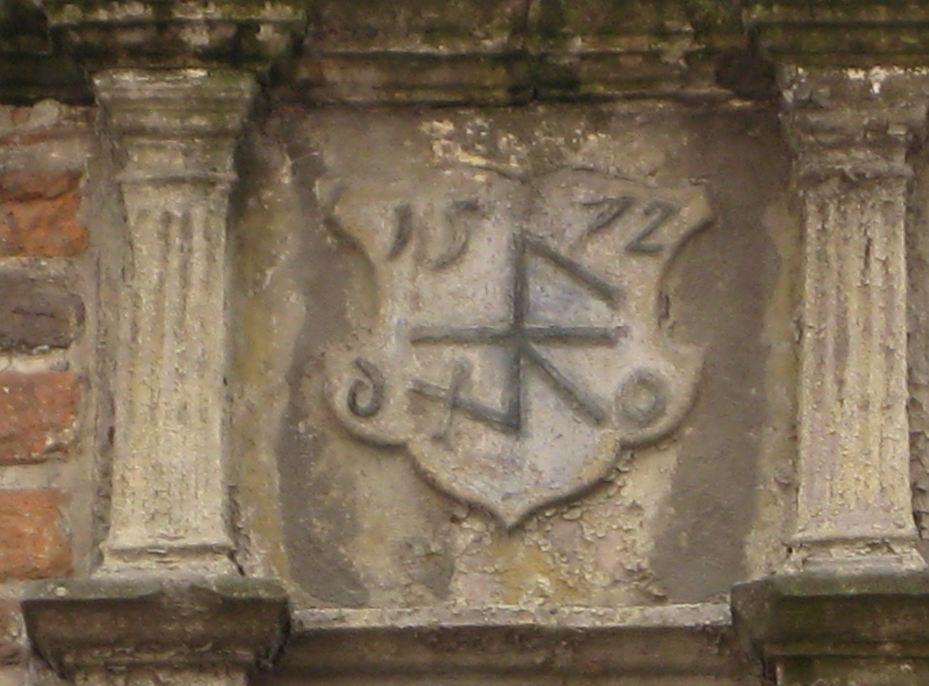 Hausmarke von 1572 an der Fassade des Hauses Glockengießerstraße 26.